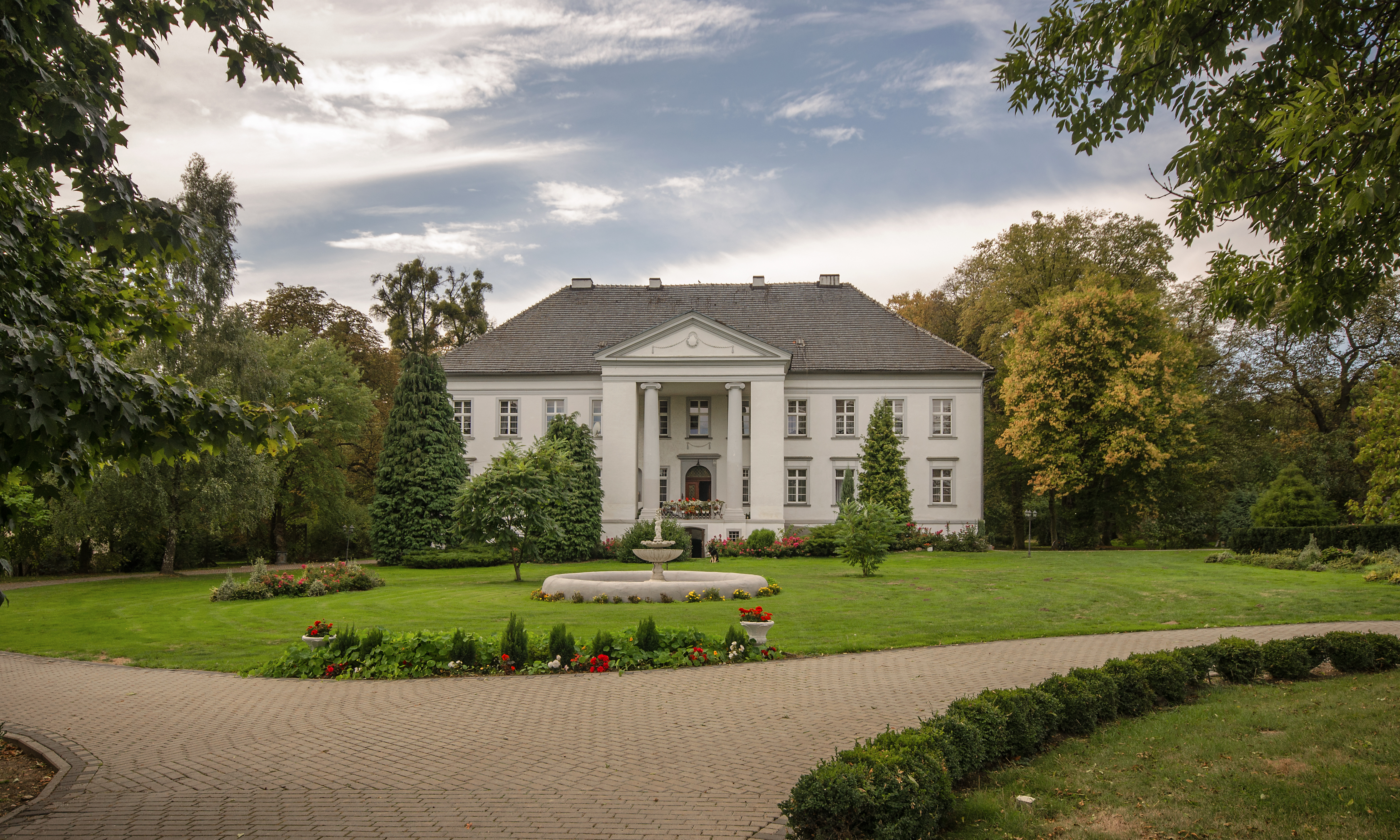 Maciejów, pałac, 1800